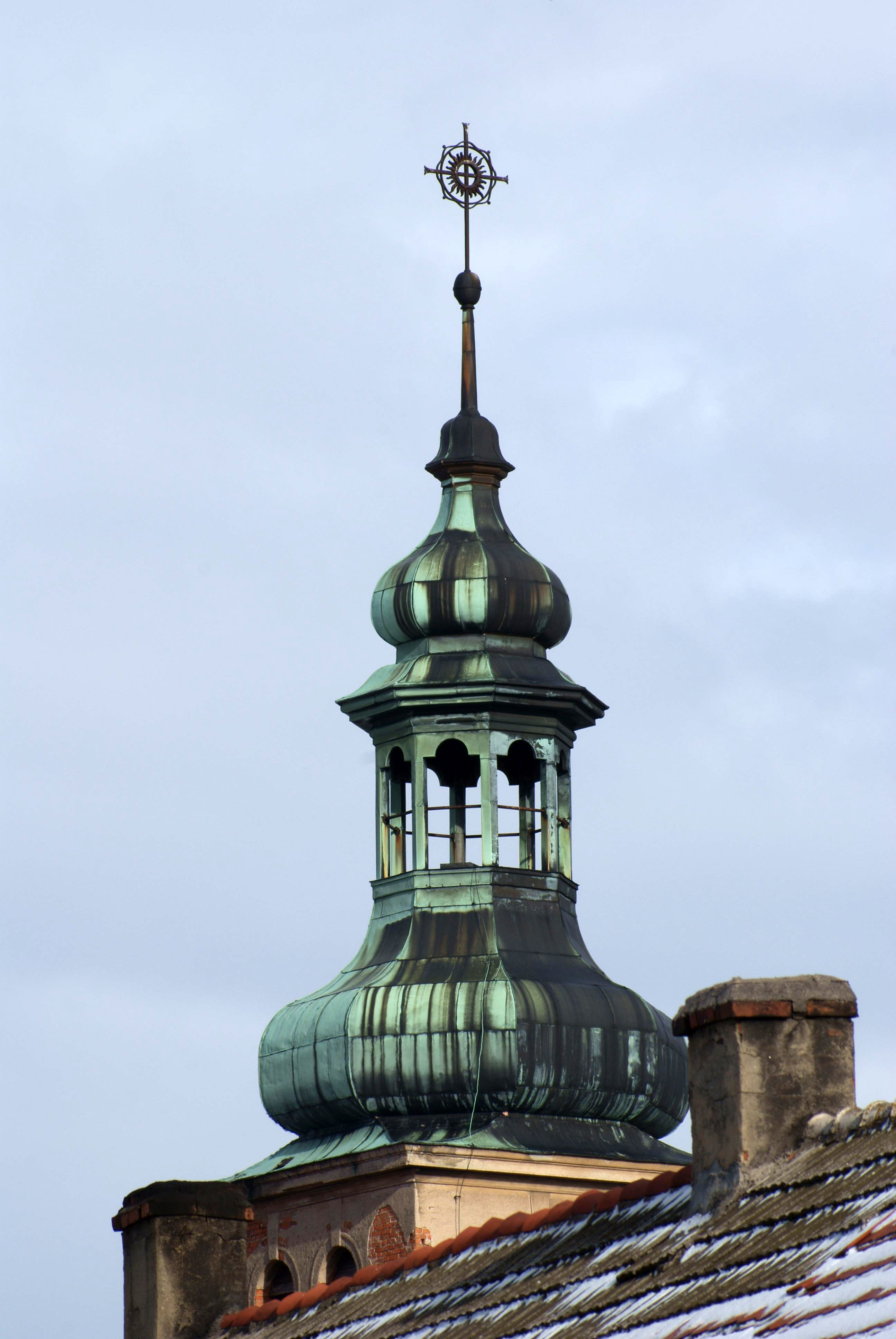 Kamienica - wieża kościoła parafialnego p.w. św. Jerzego (zabytek nr A-86/2009 z 24.03.2009)